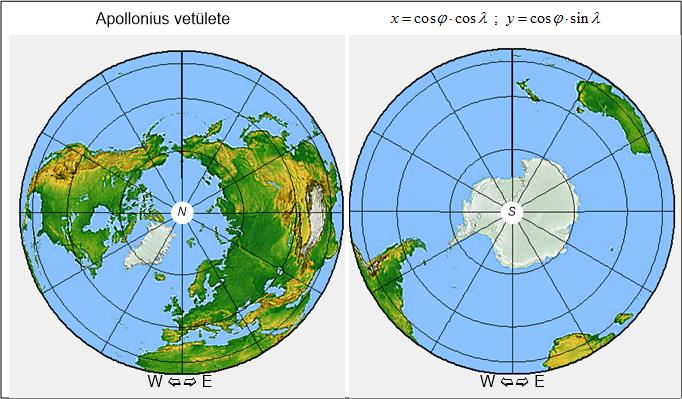 Apollonius-féle térképvetületek